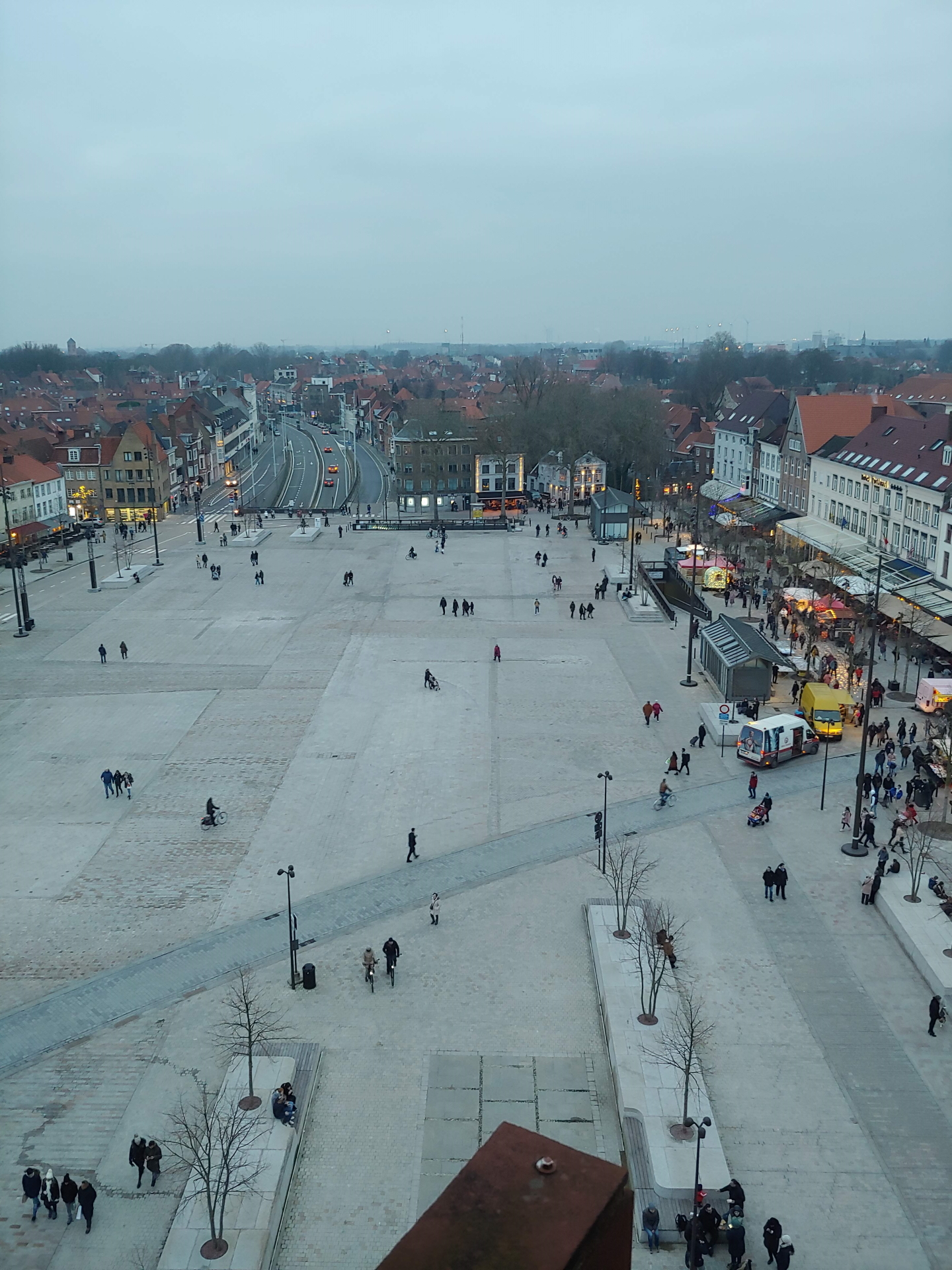 't Zand (2019) van op de Lantaarntoren (Concertgebouw)